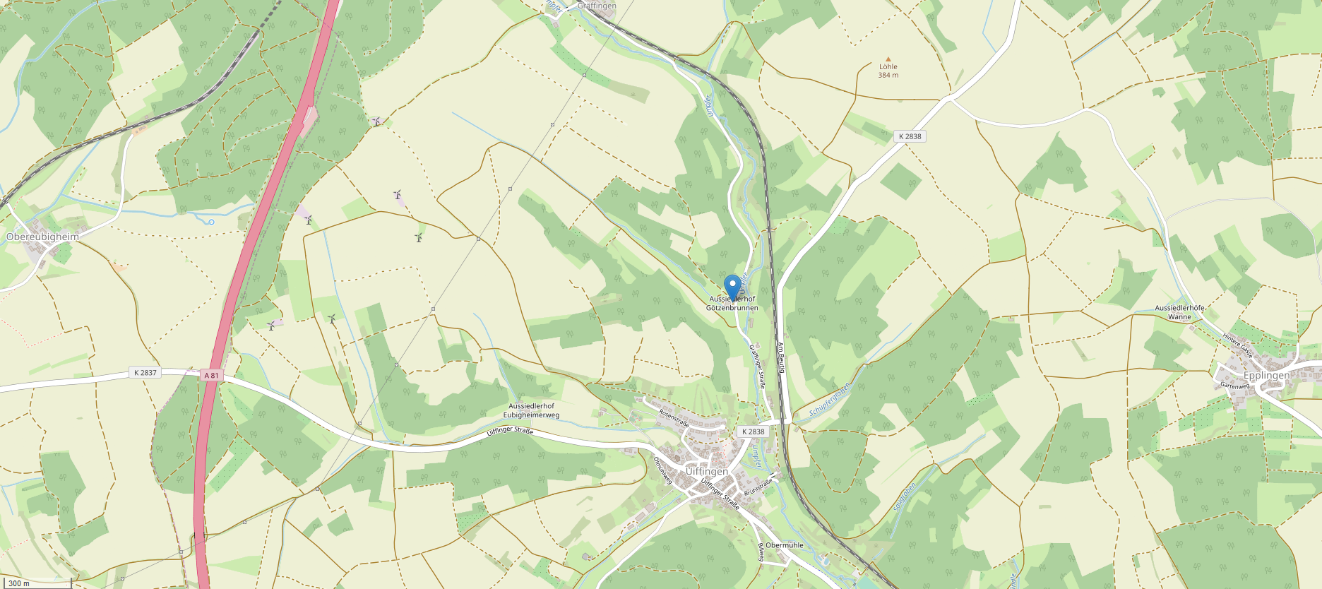 Lage des Wohnplatzes Aussiedlerhof Götzenbrunnen auf der Gemarkung von Uiffingen (Boxberg)